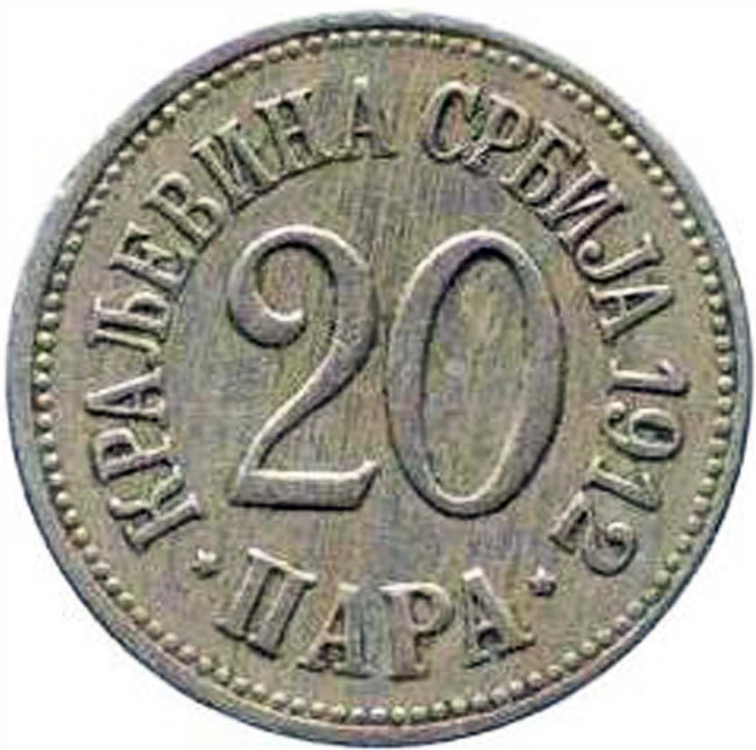 Srpski (latinica): Revers 20 para iz 1912. godine, Kraljevina Srbija